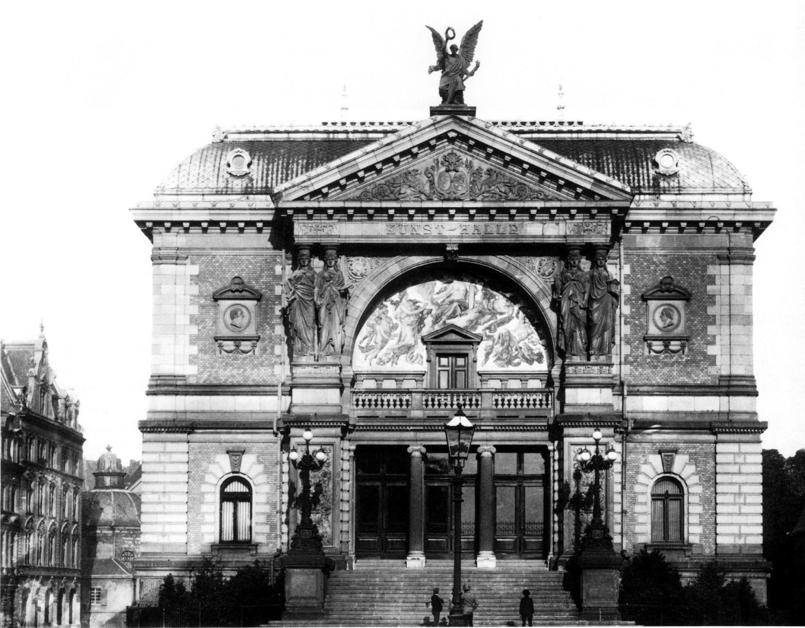 Die alte klassizistische Kunsthalle in Düsseldorf